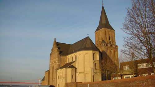 Nedersaksies: Emmerich_St._Martinikarke.jpg